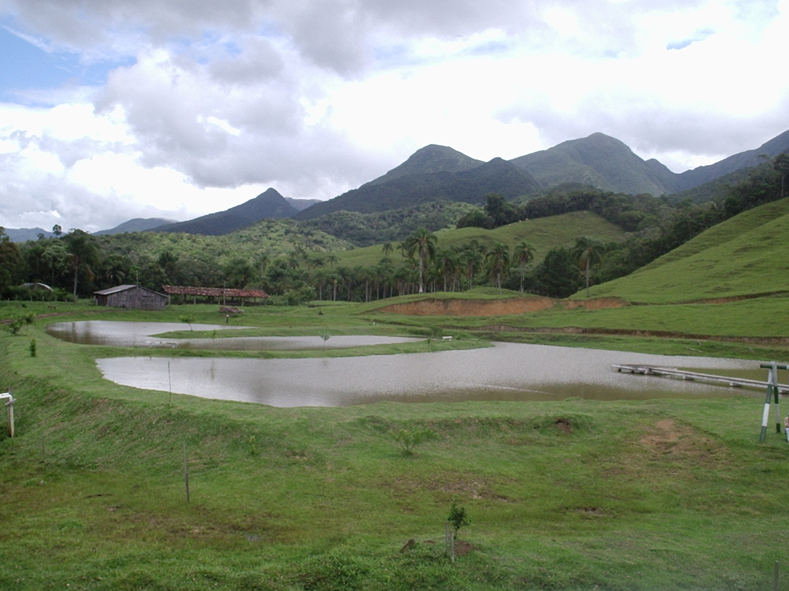 Agricultor da Vargem do Braço.